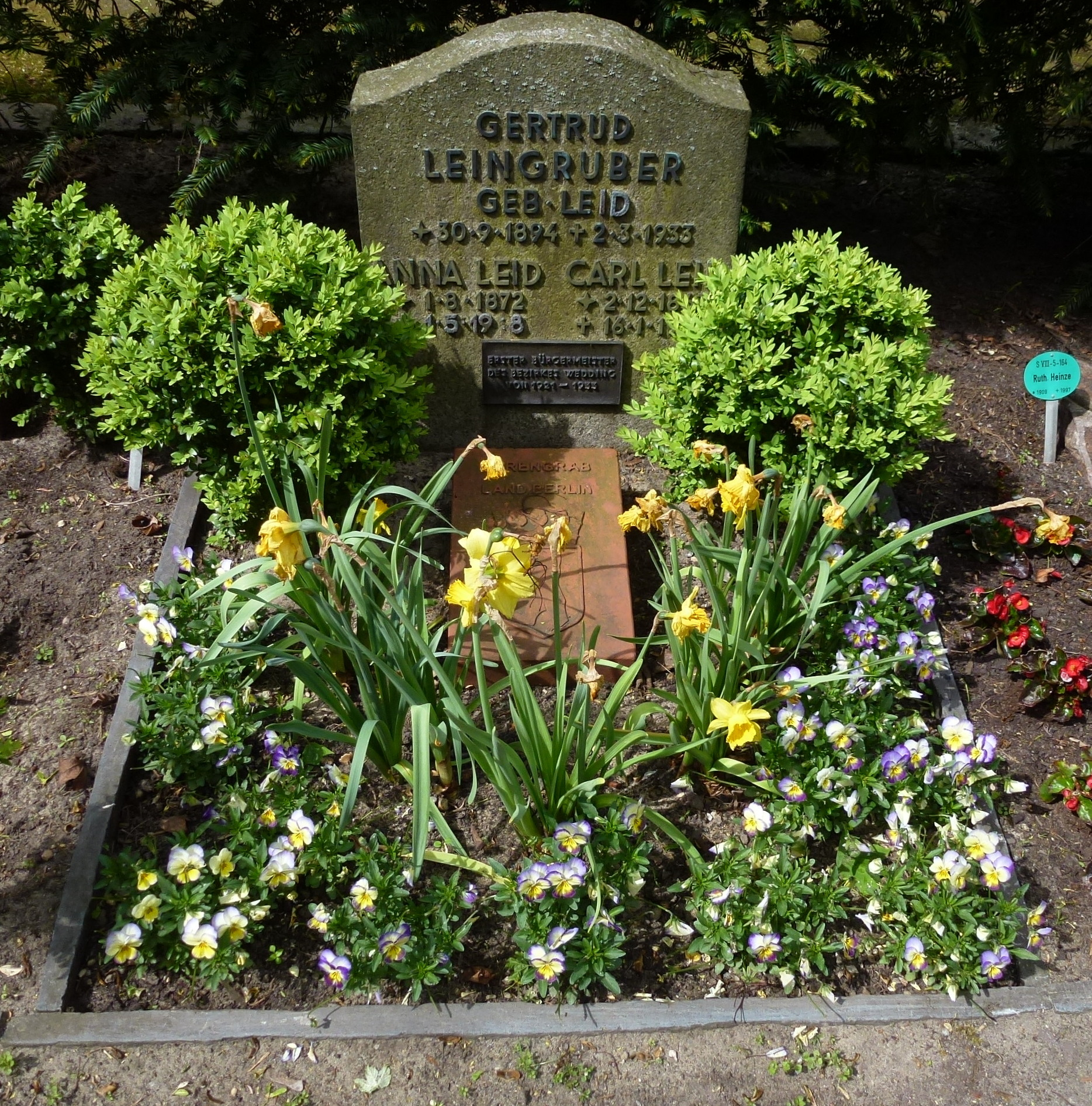 Berlin-Wedding Ehrengrab von Carl Leid auf dem Urnenfriedhof Seestraße Abt. VIII, 5/165